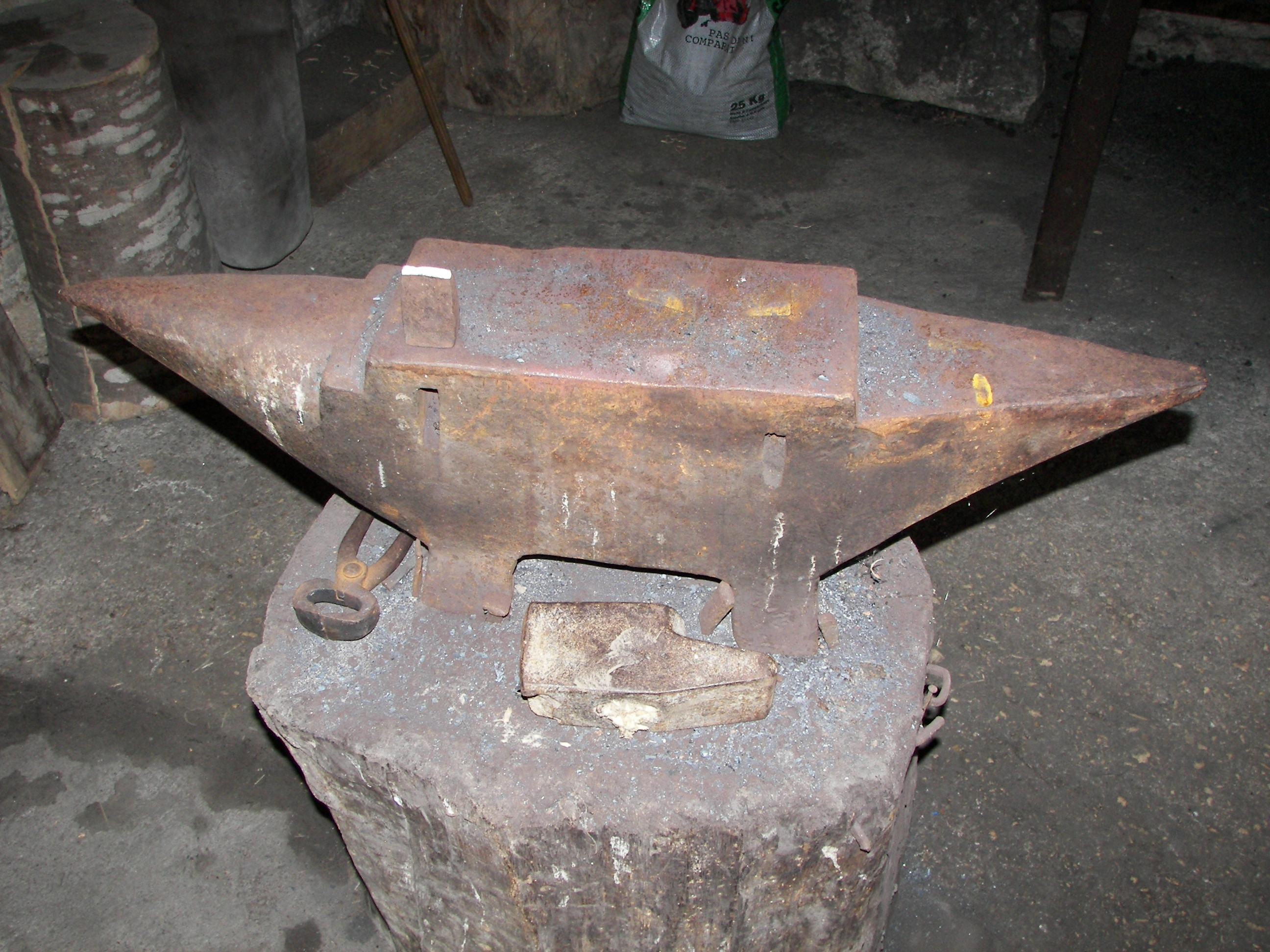 Enclume d'une Forge en Dordogne